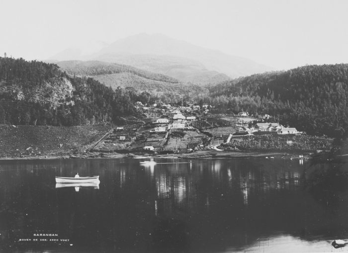 foto. Hotels aan het meer van Sarangan